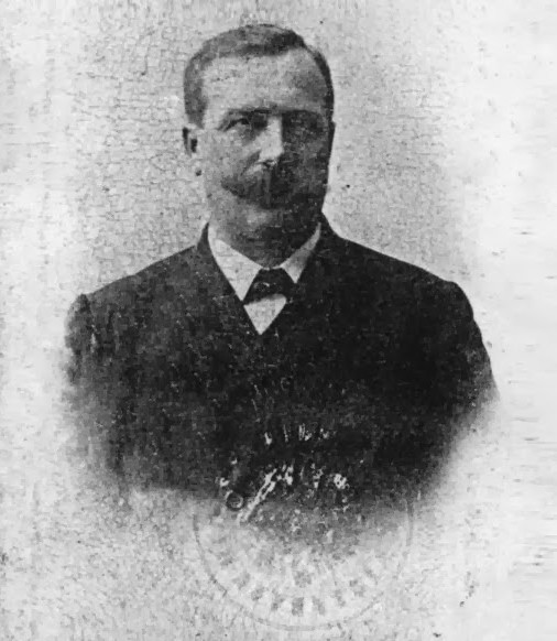 Maciej Fijak (1862-1949), poslanec Říšské rady